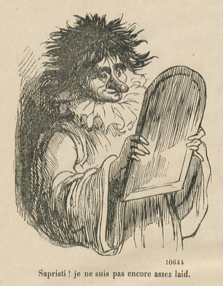 Un Parisien en Carnaval.